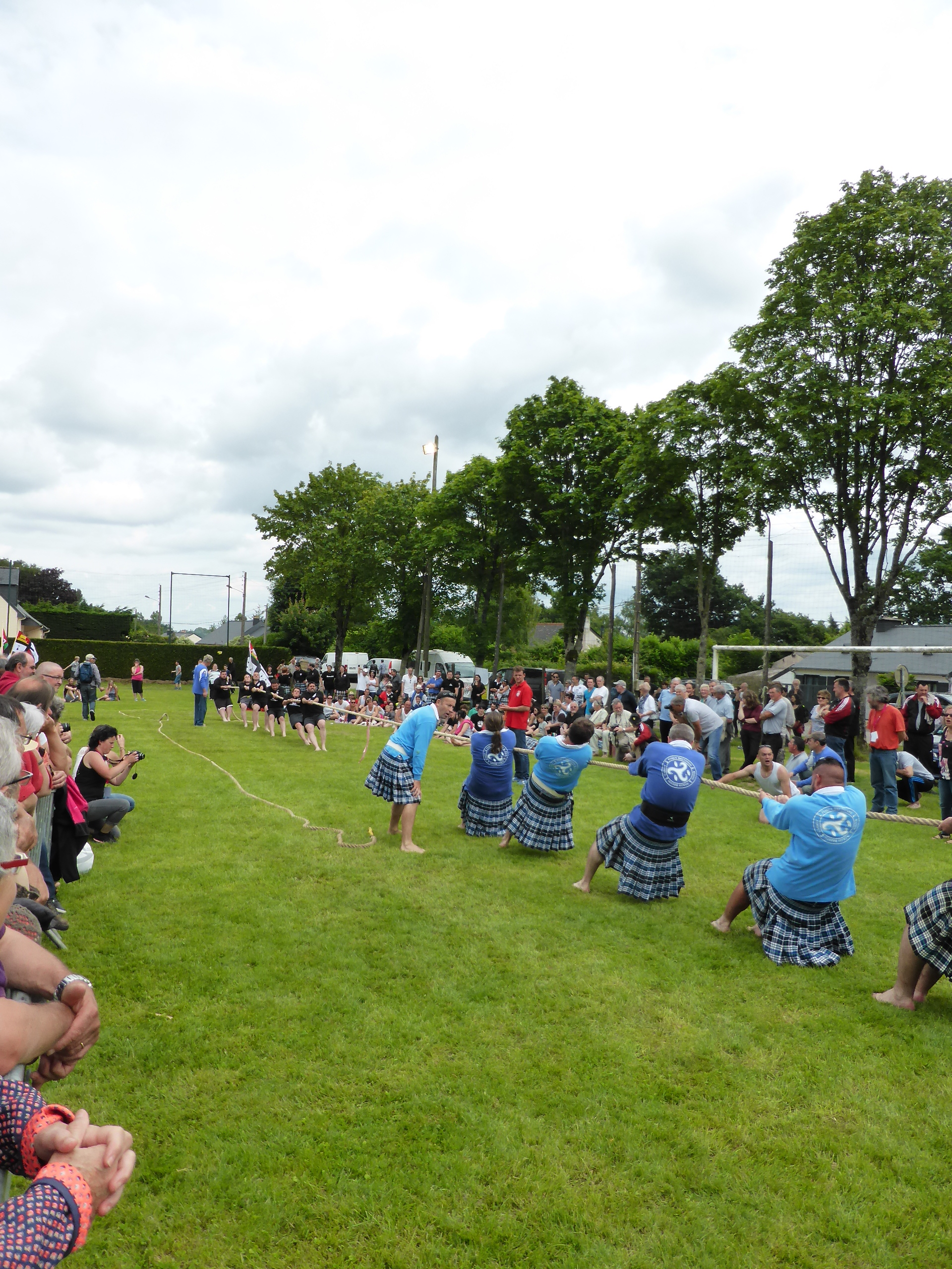 Concours de tir à la corde à la Gallésie en Fête de Monterfil (35) 2016